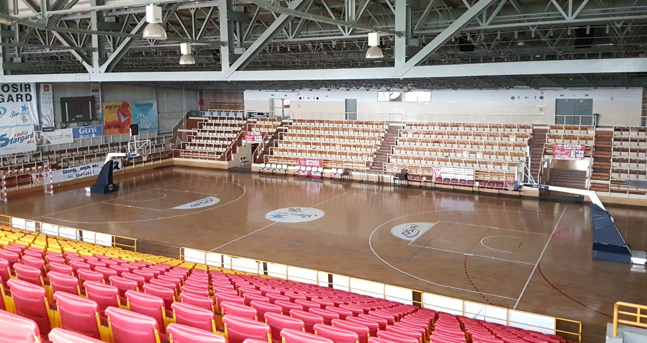 Stargard,05.05.2017r. Hala OSiR, widok na starą trybunę